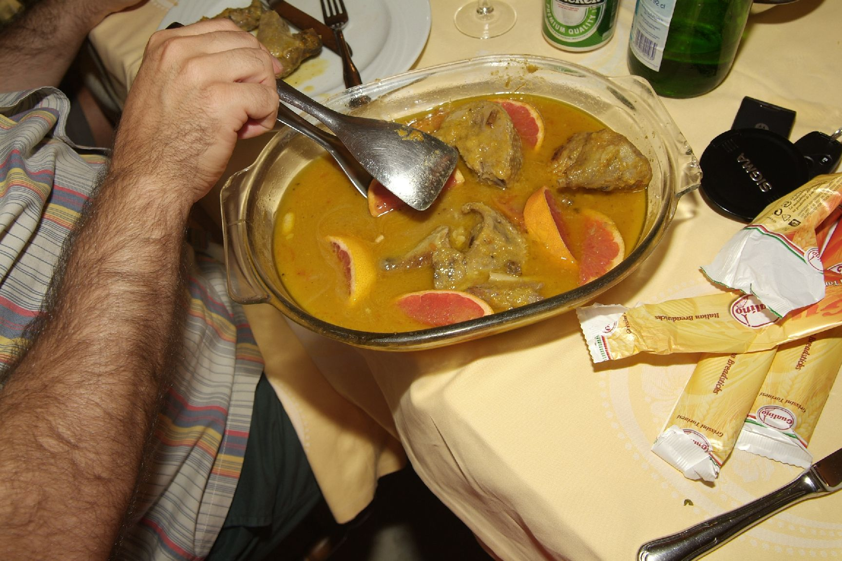 Anatra all'arancia Raduno di Piozzano (PC) - 14/15 luglio 2007